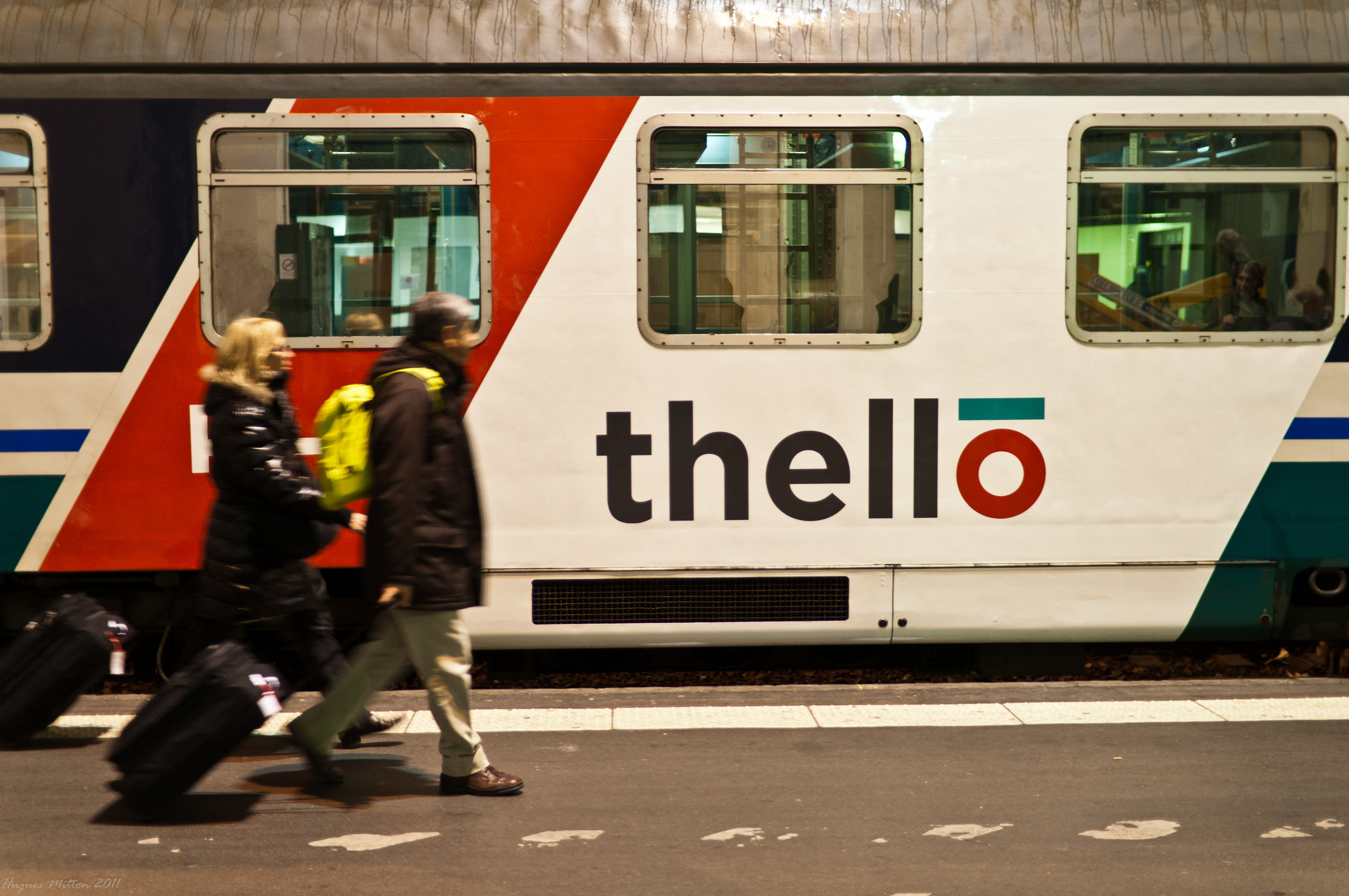 Départ du premier train Thello à Paris gare de Lyon le 11 décembre 2011